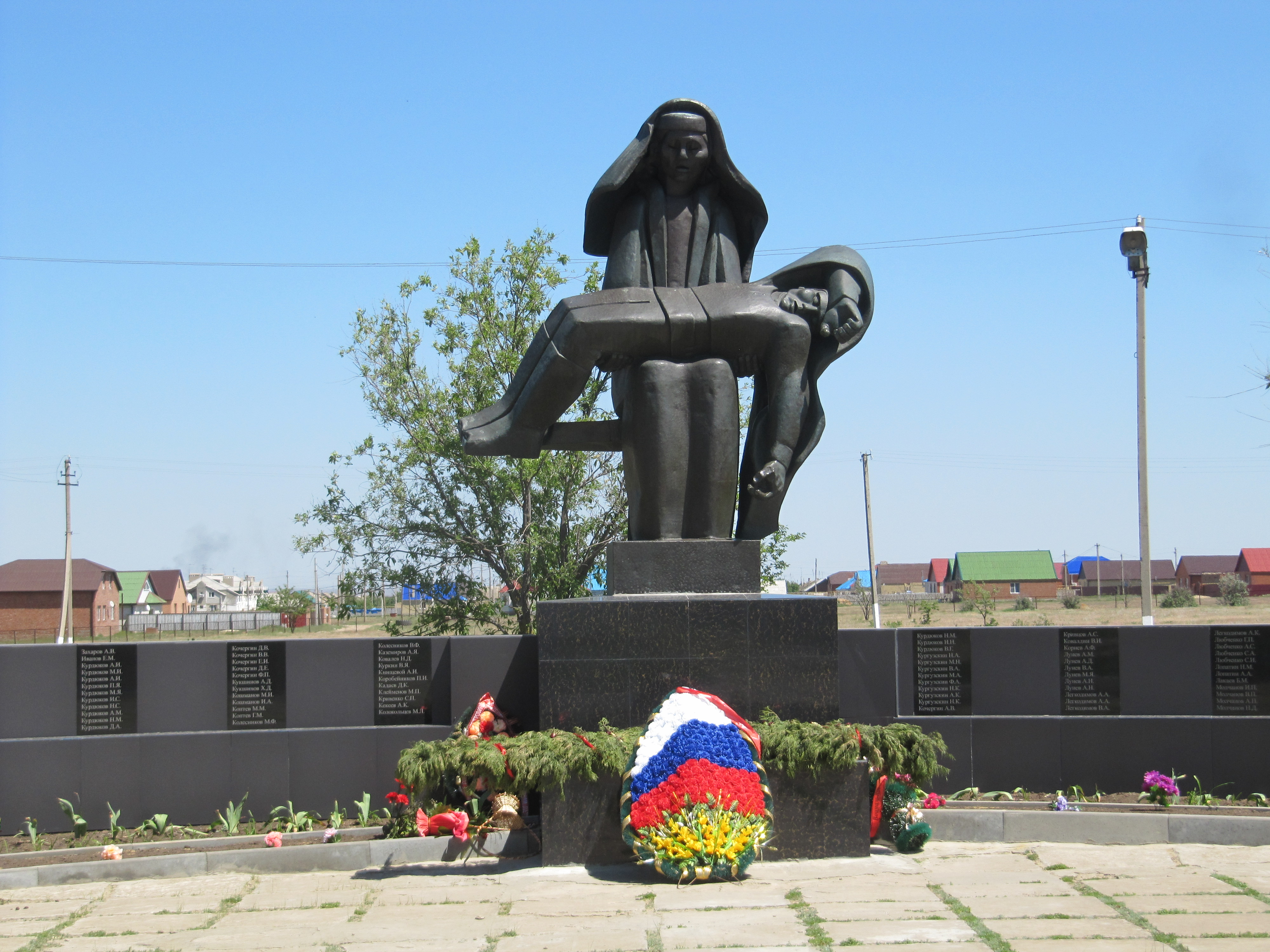 Мемориальный комплекс в селе Троицкое, Калмыкия